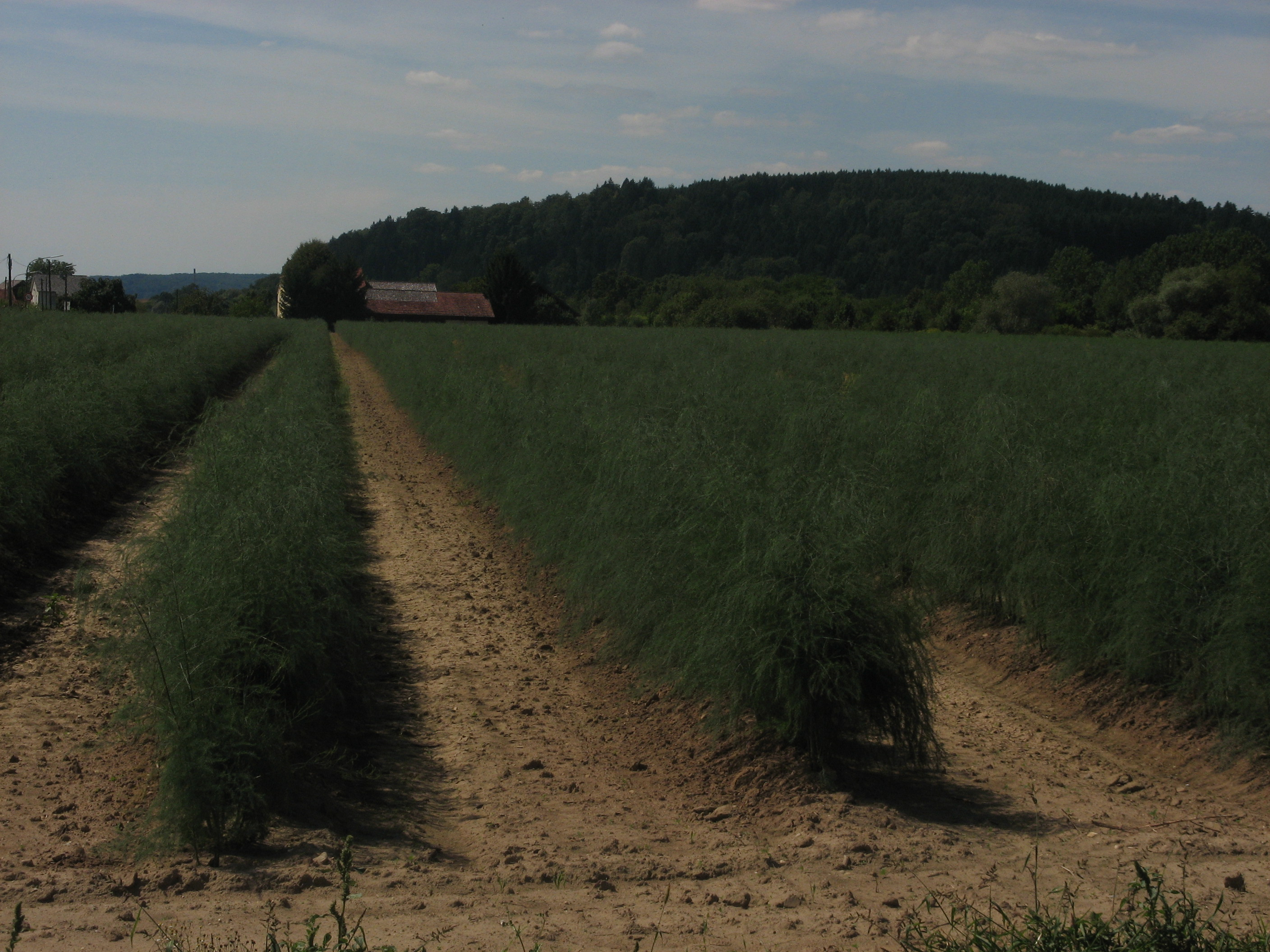 Dans du sable